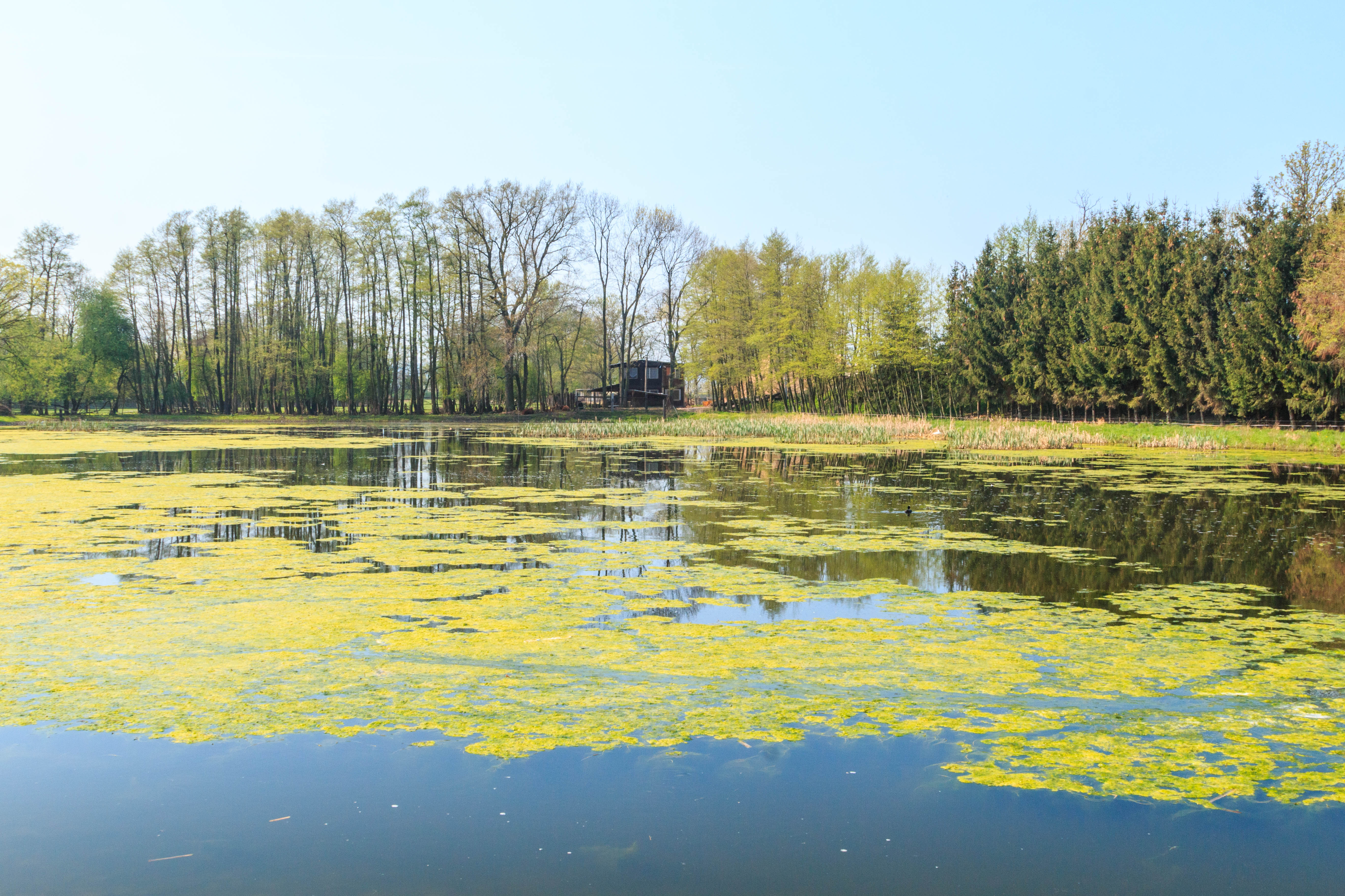 Rybník Jezbořák v Jezbořicích u Pardubic Project: Vodstvo.